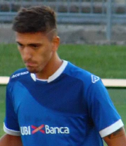 Emanuele Ndoj